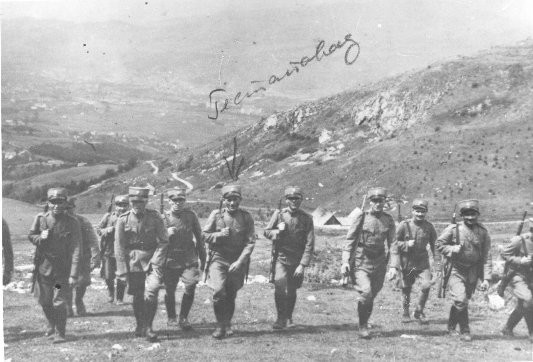 Srpskohrvatski / српскохрватски: Припадници Жандармерије лојалне Милану Недићу за време претресања терена у Србији 1941.